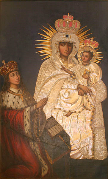 Абраз Маці Божай Тракельскай